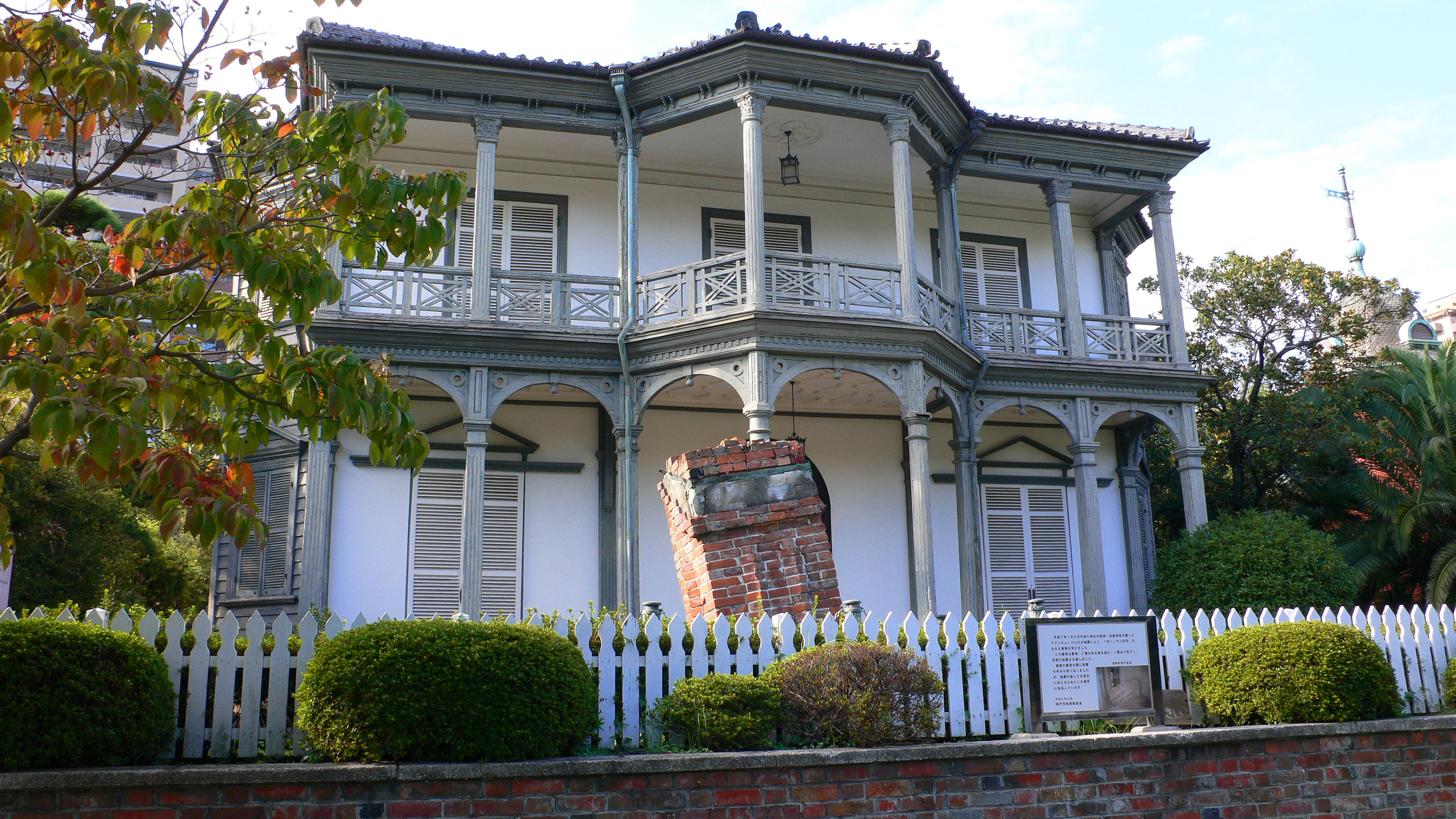 "Hassam House" in Sorakuen, Kobe, Hyogo, Japan